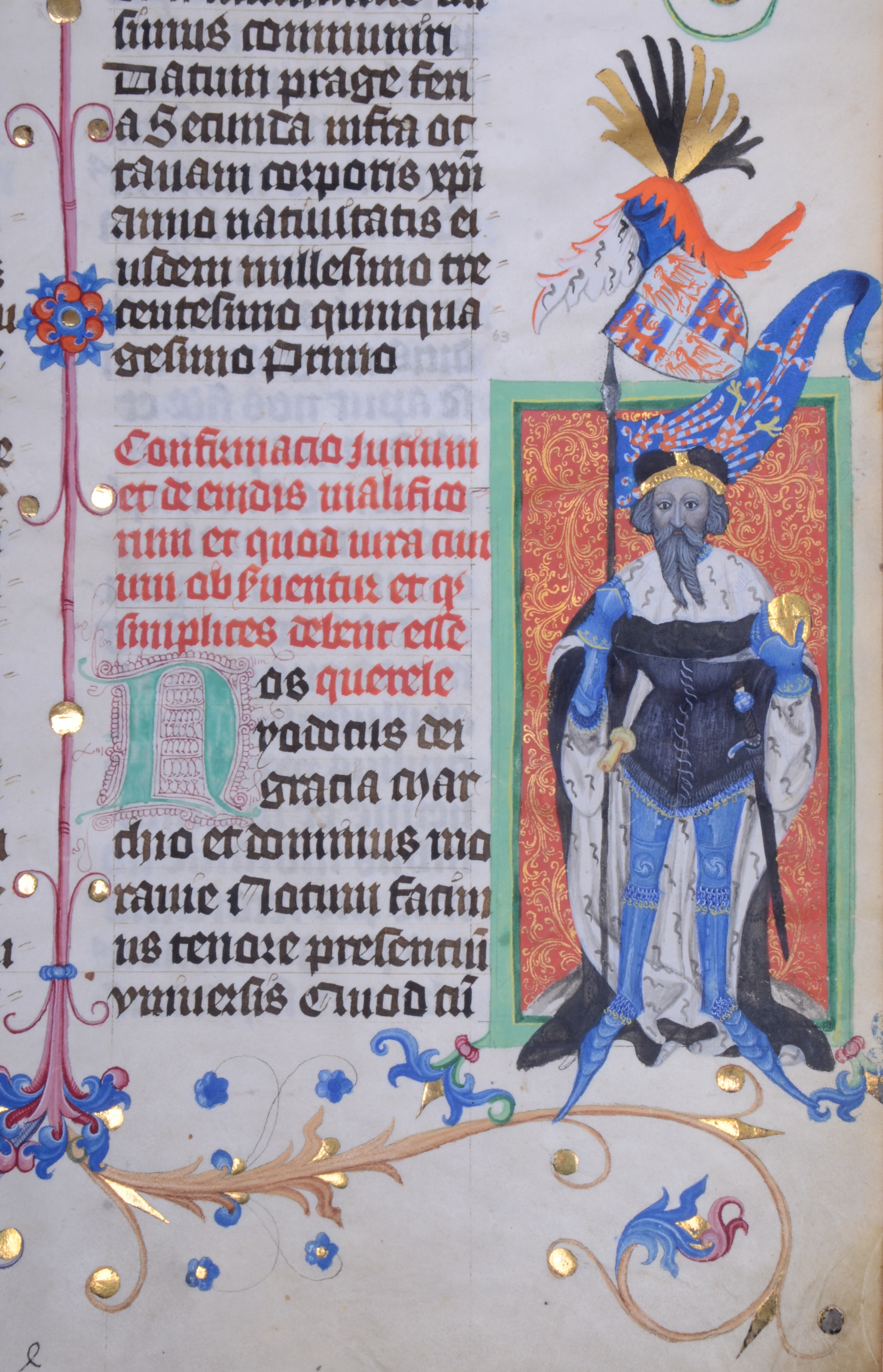 Kodex Gelnhausen (kodex A) - právní kniha, fol. 63r